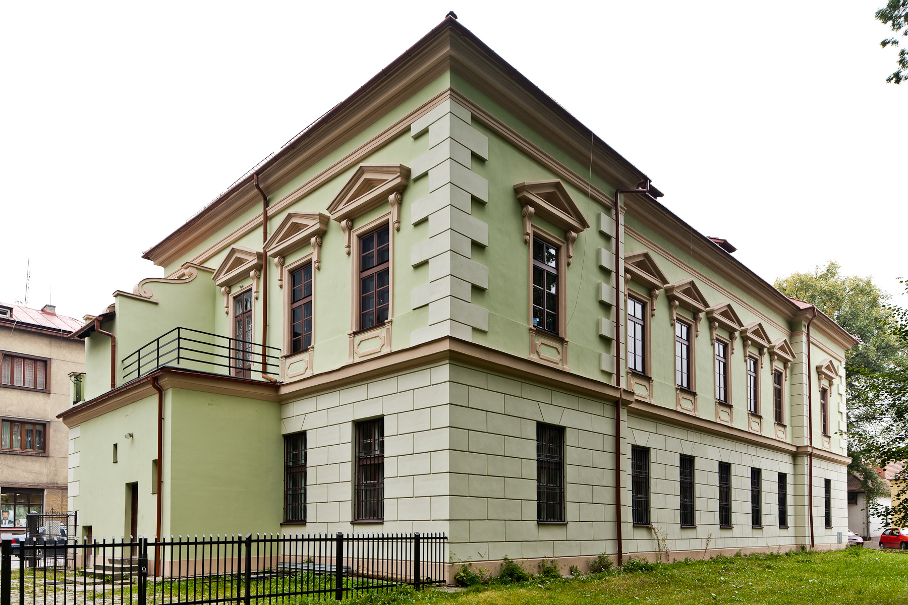 Pałac Vauxhall, Krzeszowice